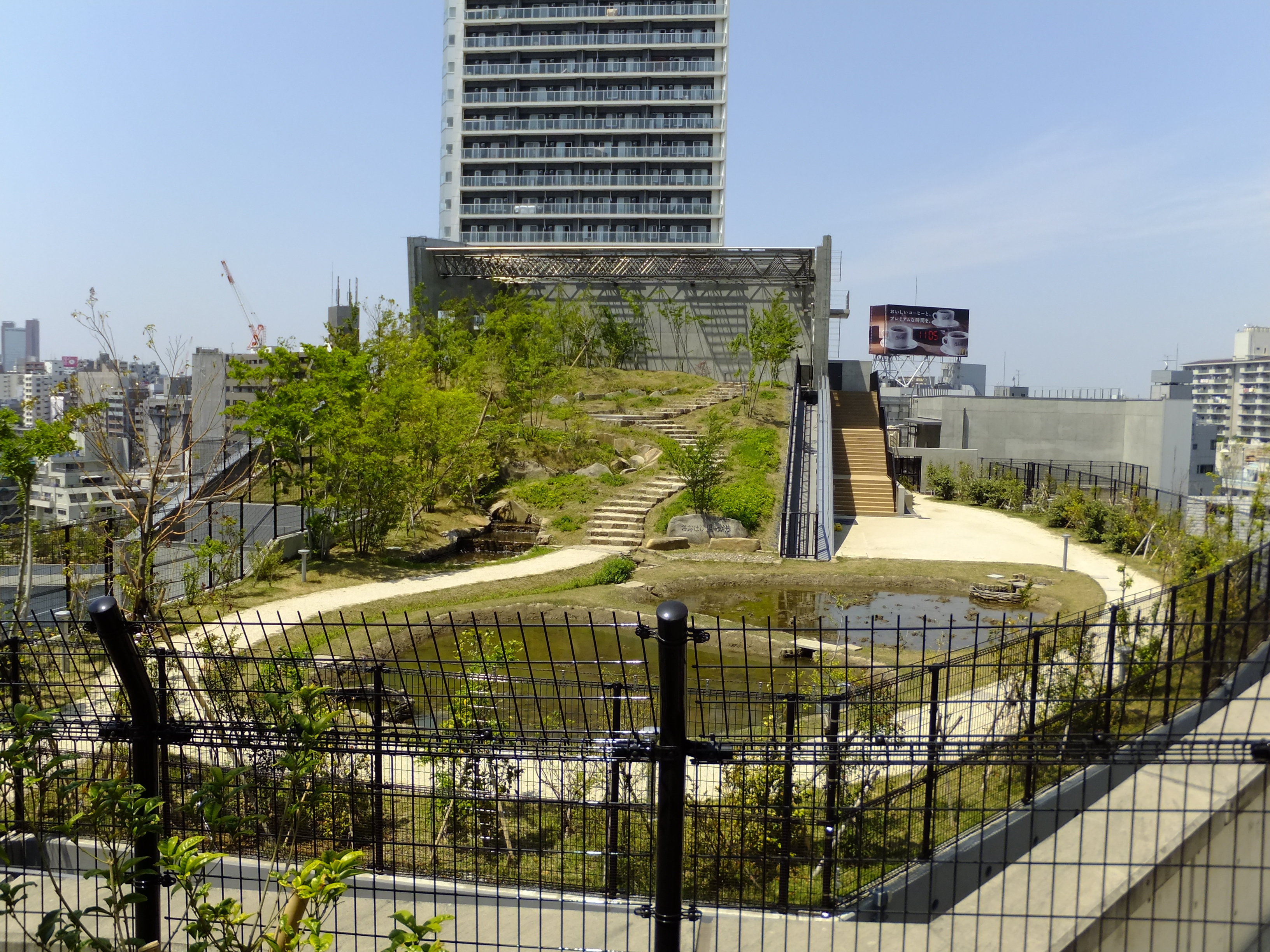 目黒天空庭園、おおはし里の杜。目黒川周辺の原風景が再現されたビオトープであり、一般には立ち入れない。